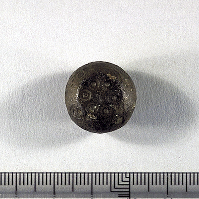 Tölö 173